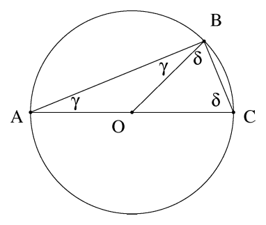 Obrázok ku dôkazu.